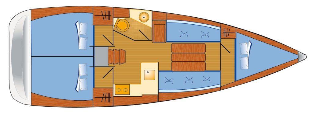 Raumaufteilung der 3-Kabinen-Version der Sun Odyssey 349